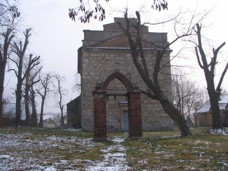 Książ Wielki - kościół rzymskokatolicki pw. św. Ducha, 1372-1381, XVI, XIX (na pierwszym planie dzwonnica)